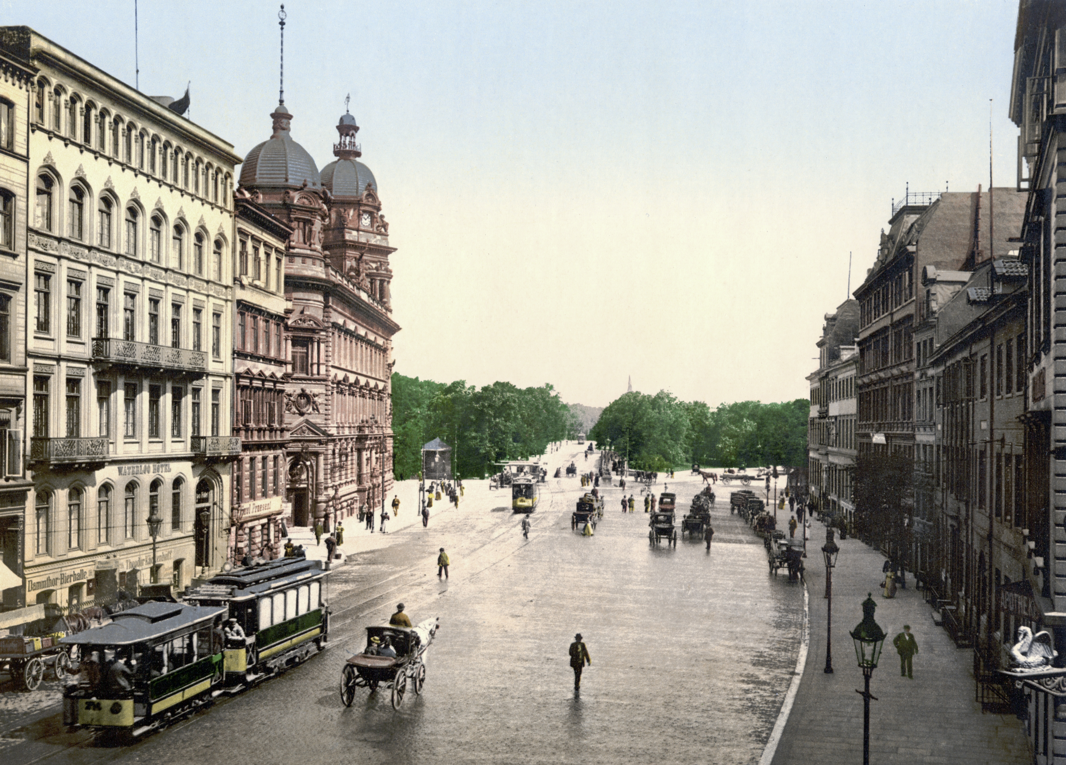 Die Dammt(h)orstraße in der Hamburger Neustadt mit Blick Richtung Stephansplatz. Links hinten ist das Gebäude der ehemaligen Oberpostdirektion zu sehen, das von 1883 bis 1887 erbaut wurde.